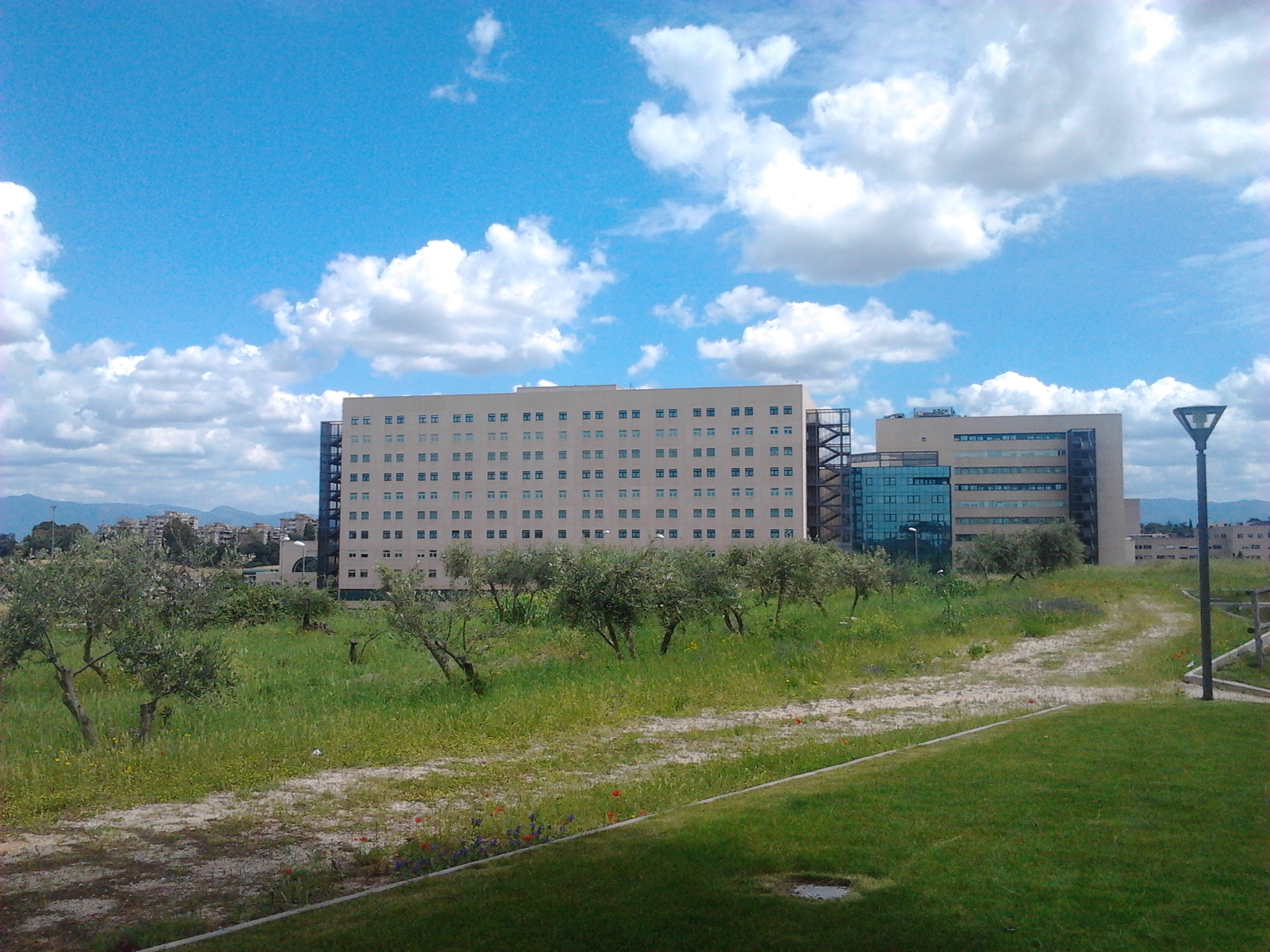 Veduta da nord del Policlinico di Roma Tor Vergata